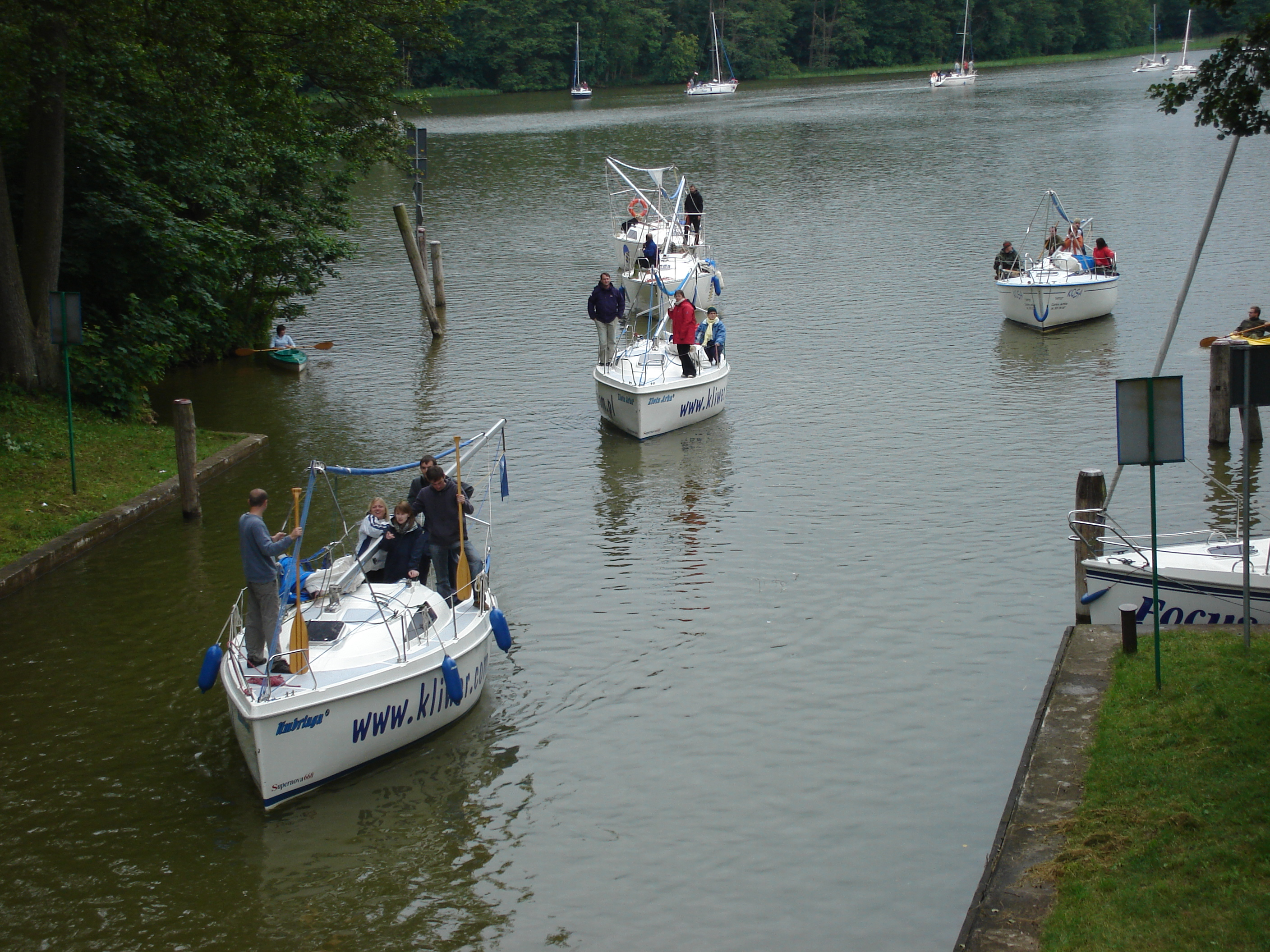 Śluza Guzianka. Jachty wpływają do śluzy.